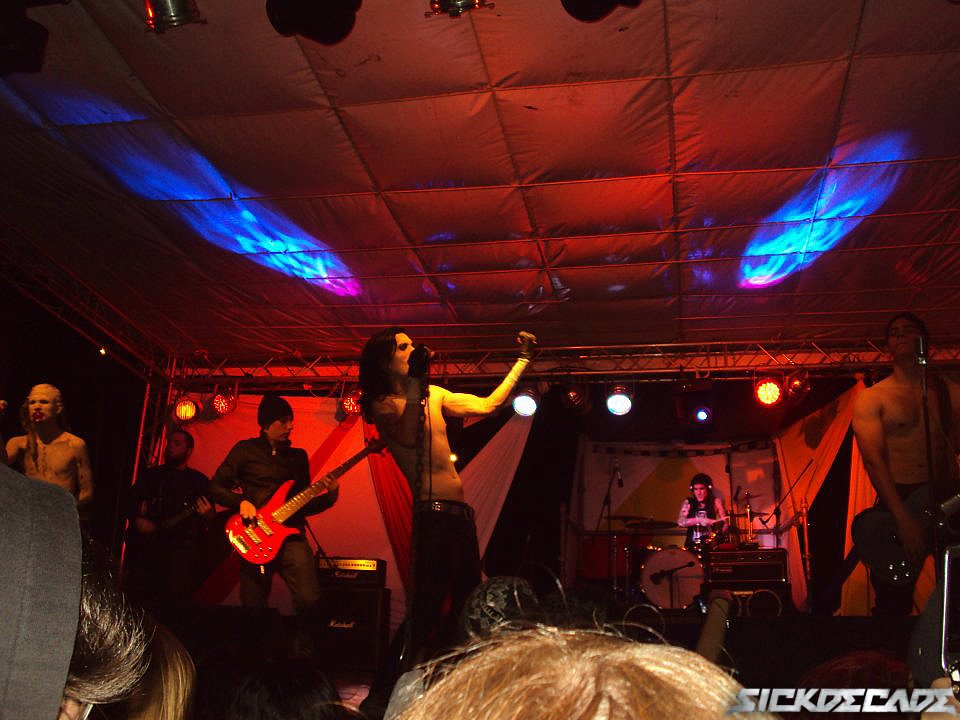 conect